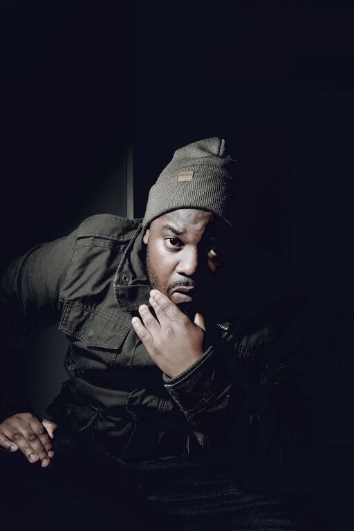 Heliocopta von Peti Free